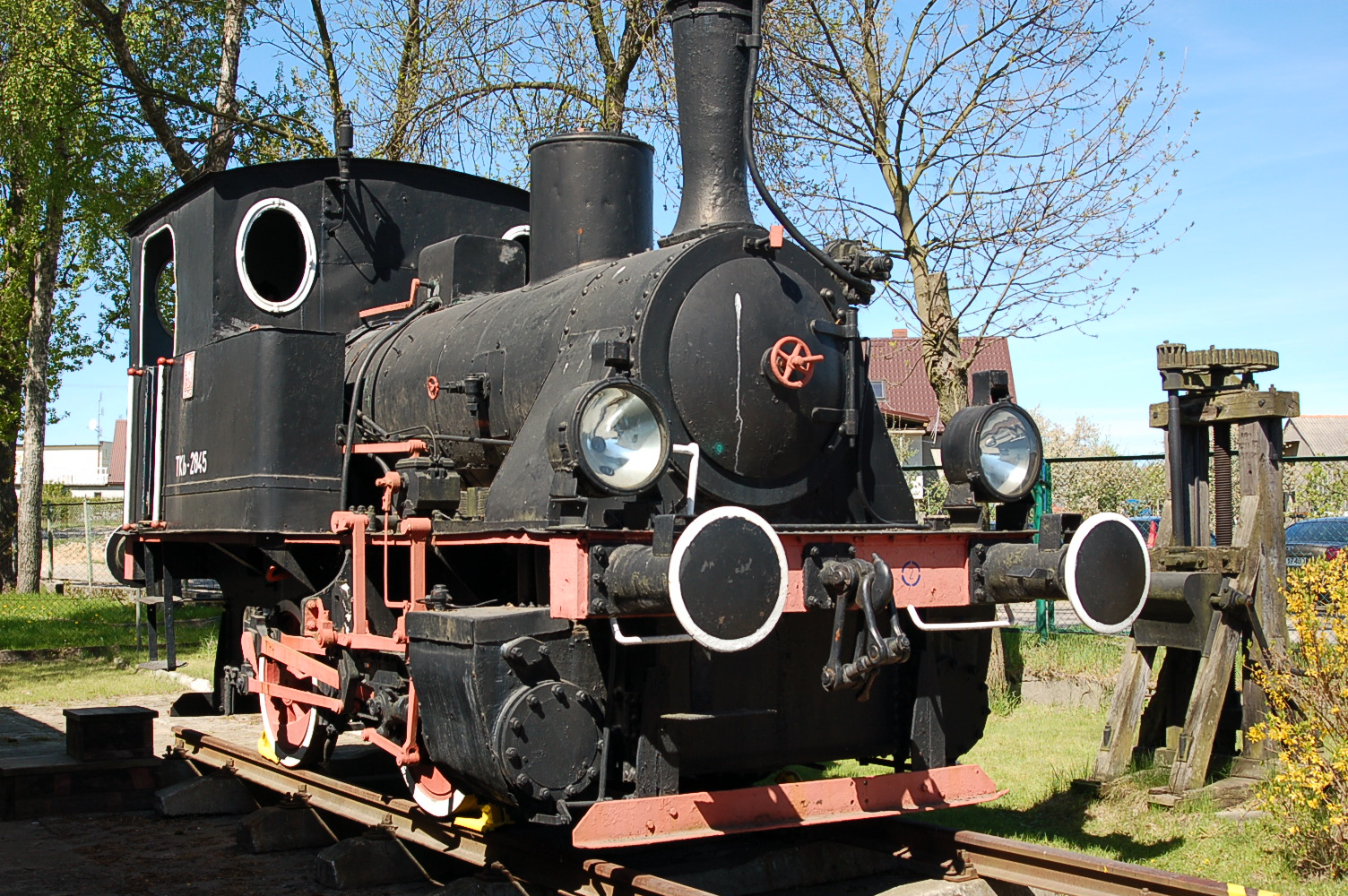 TKb-2845 locomotive in Skansen Parowozownia Kościerzyna